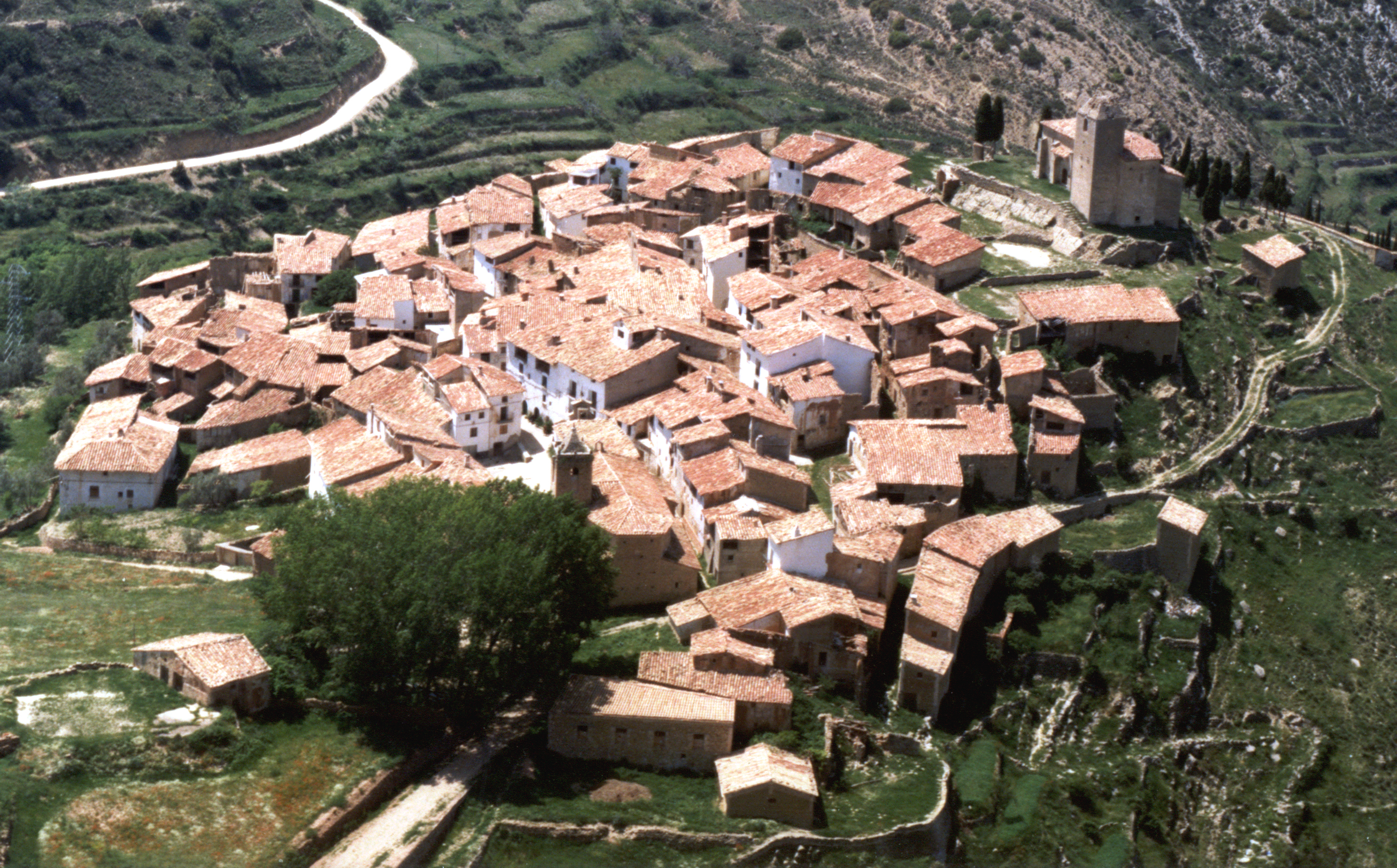 Pueblo de Luco de Bordón